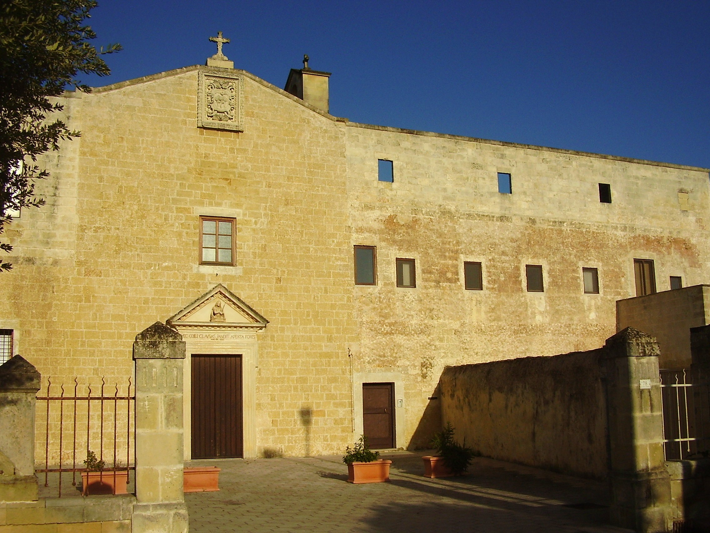 Chiesa di Santa Maria degli Angeli Scorrano, Lecce